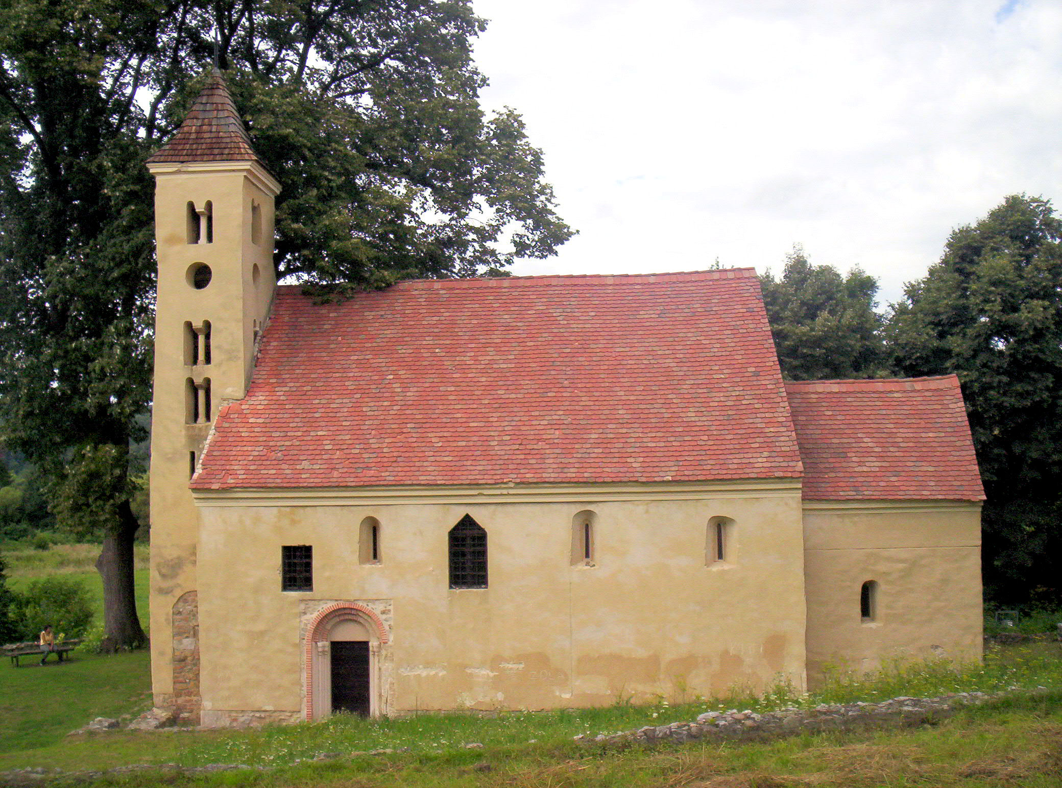 A mánfai Sarlós Boldogasszony-templom. Épült a 12. században. A 12. század végén és a 14. században átalakították – photo taken by uploader User:Csanády